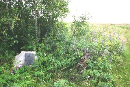 Камень на месте расстрела нацистами евреев деревни Славени Толочинского района во времена Холокоста.